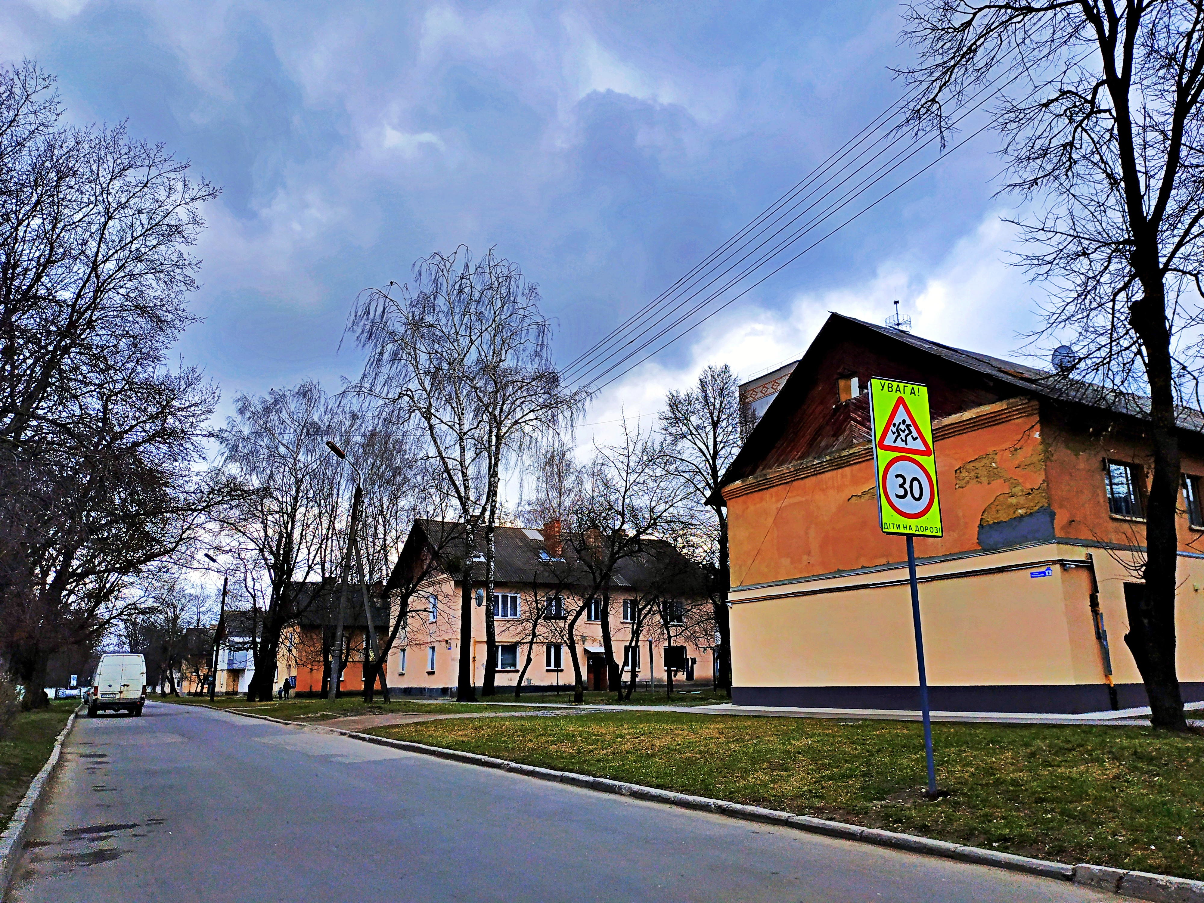 Житлові будинки по вул. Ракетників (кол. Якіра) колишнього військового містечка у мікрорайоні Ракове.